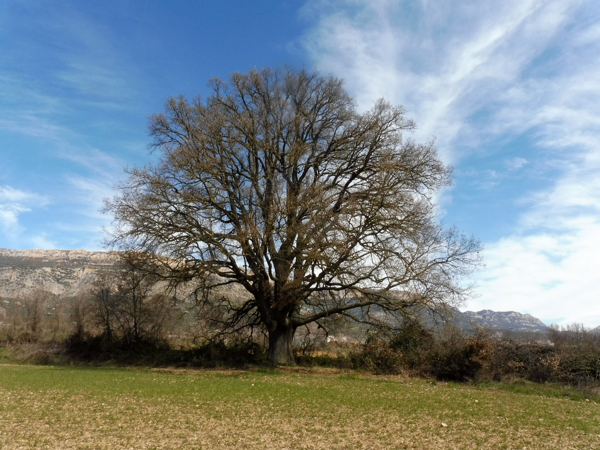 Roure del Corp de Montardit (Àger) This is a a photo of a protected or outstanding tree in Catalonia, Spain, with id: MA-23.002.02